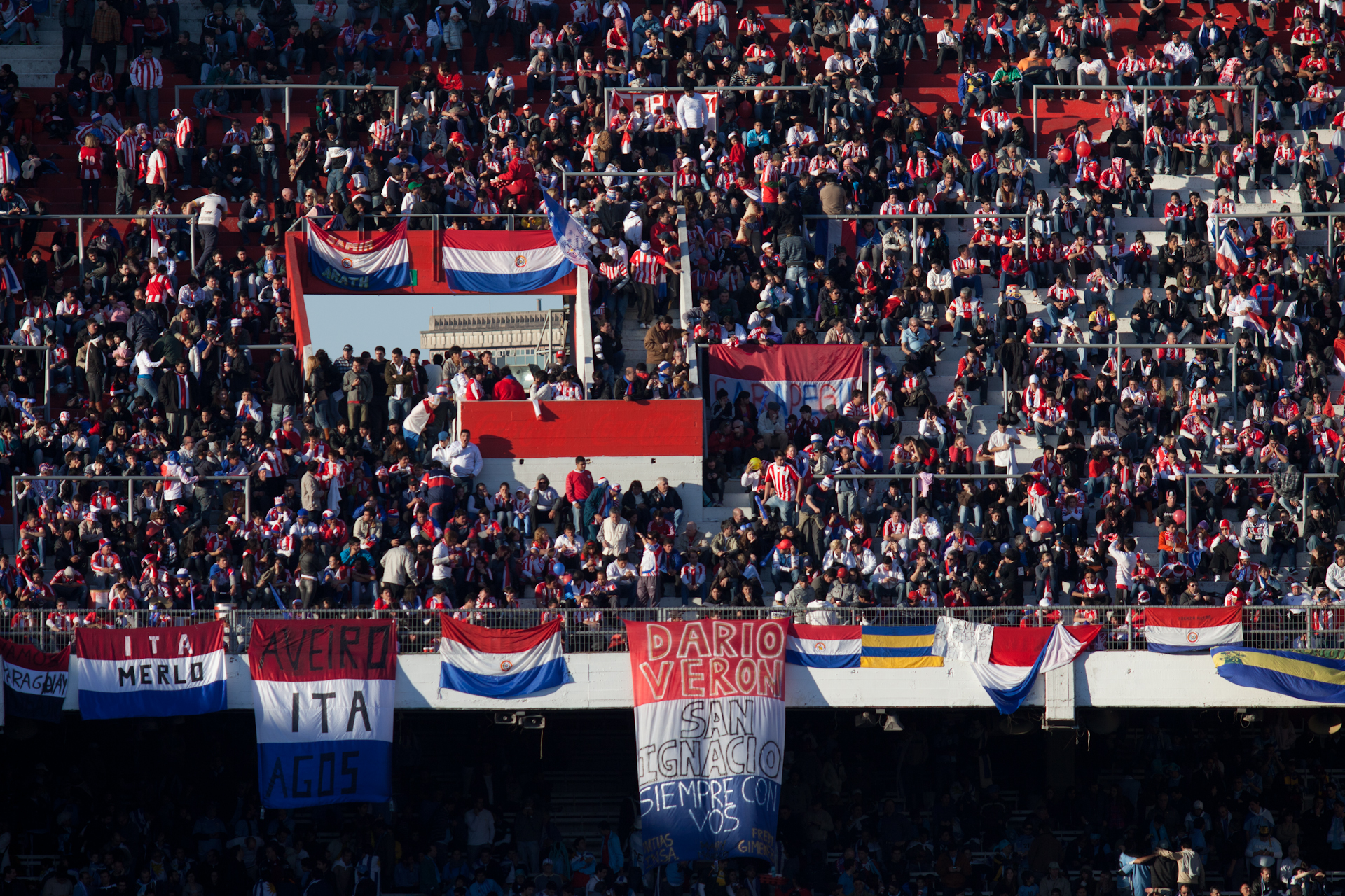 Aficionados paraguayos durante el partido final de la Copa América 2011, entre Uruguay y Paraguay. Estadio Monumental Antonio Vespucio Liberti, Buenos Aires, Argentina.